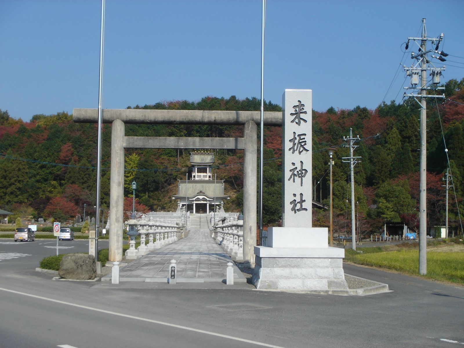 Kiburi Jinjya(Shrine)(来振神社),Ono,Gifu,Japan(岐阜県大野町)で撮影。